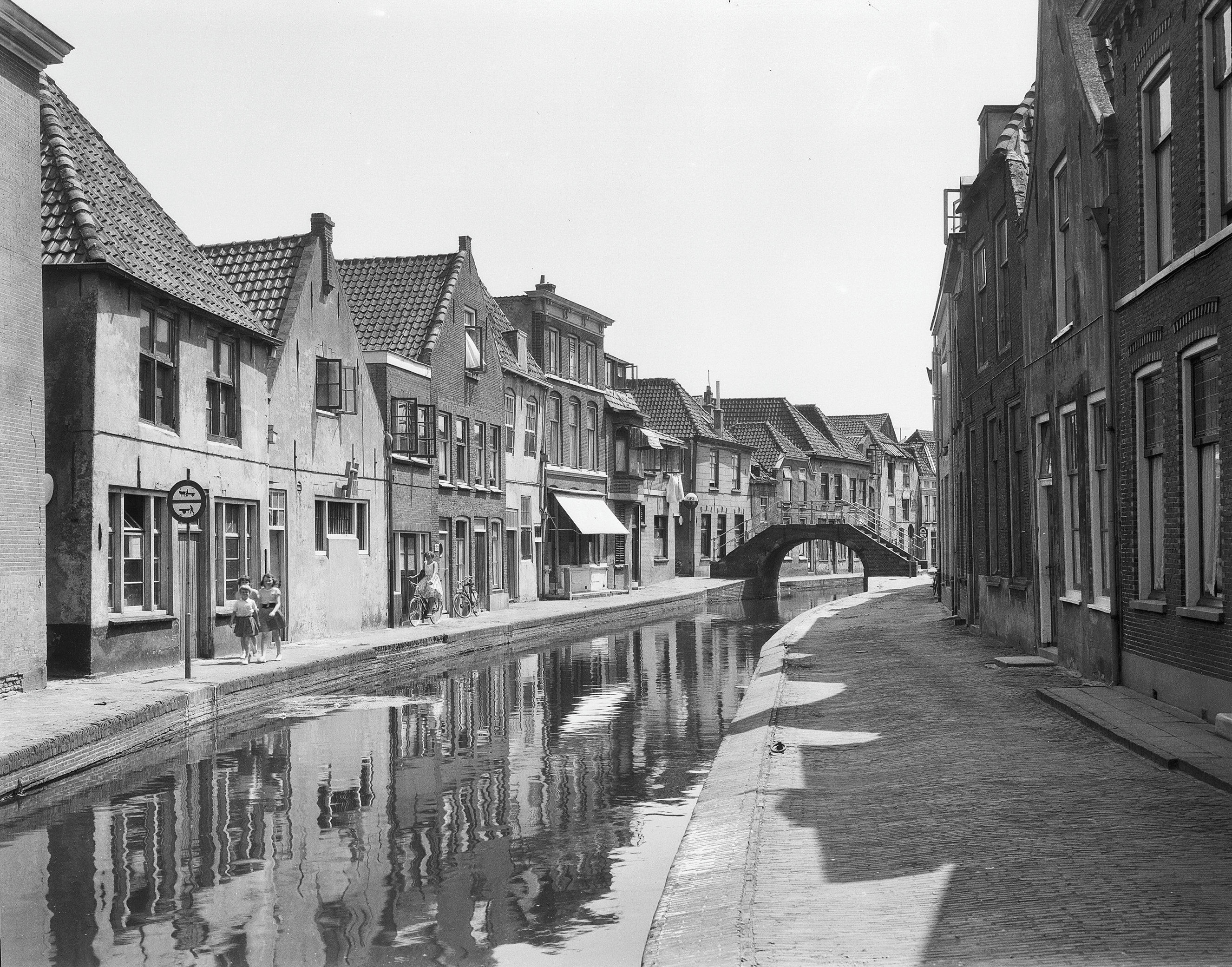 overzicht naar het oosten